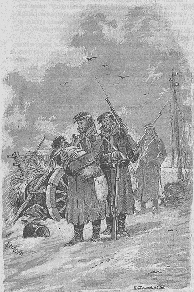 «Молодец поднял бедного ребёнка» (Русско-турецкая война 1877―1878 гг.). Иллюстрация к журналу «Разведчик».